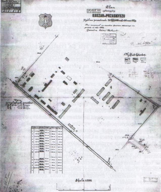 Plan sytuacyjny koszar w Przasnyszu z 1923r.